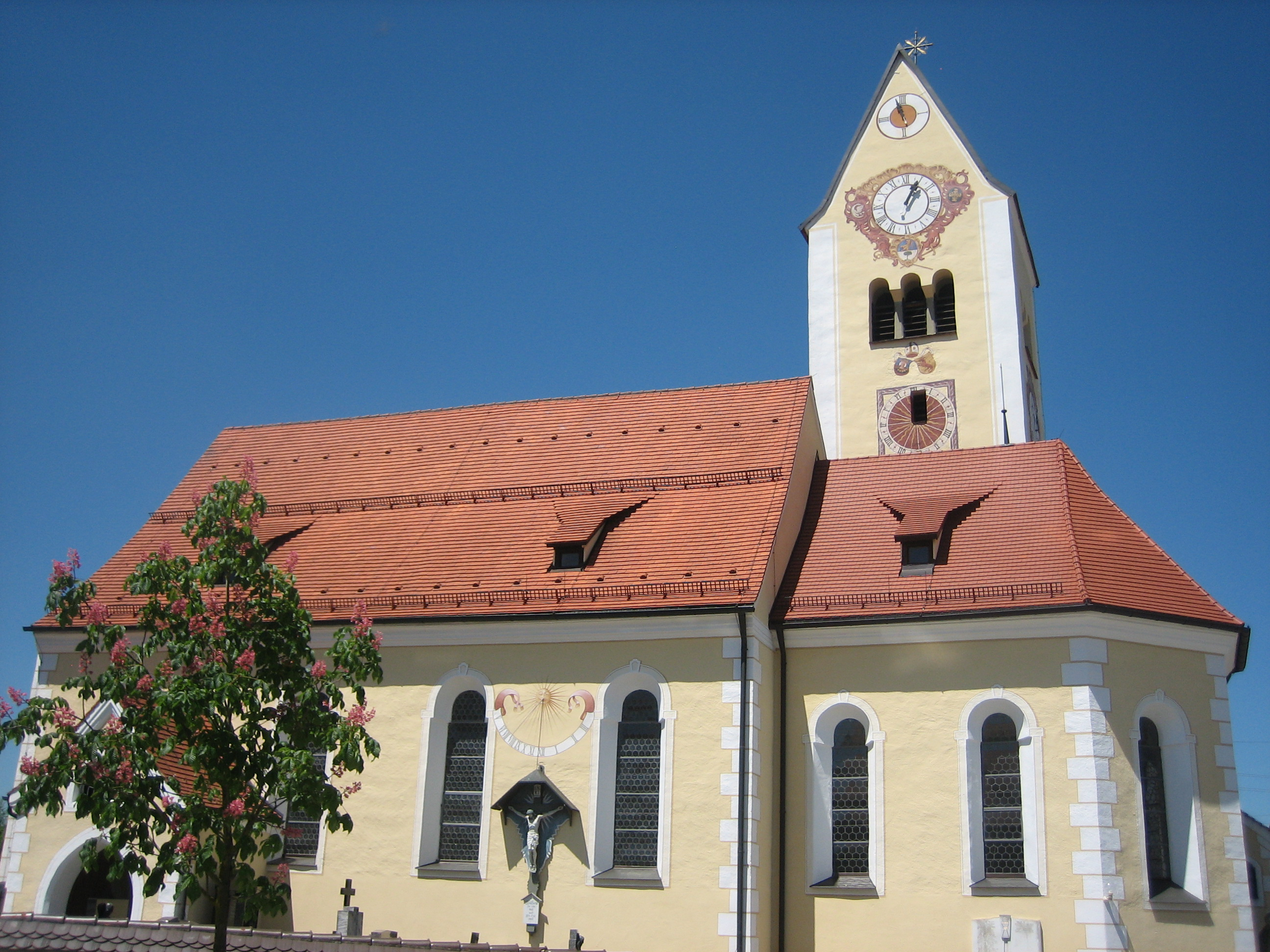 Pfarrkirche St. Vitus in Wolfertschwenden, Bayern